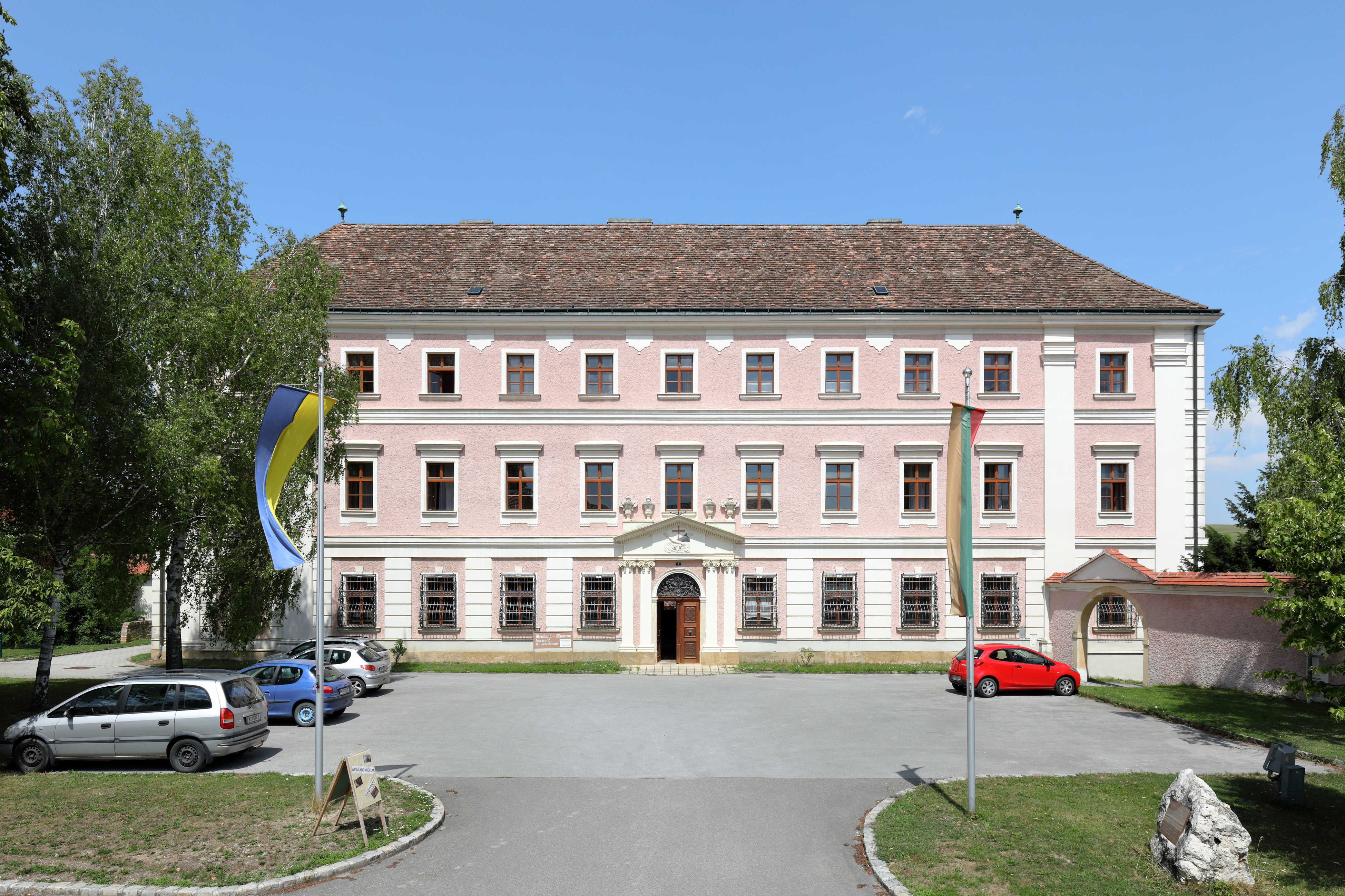 Das Minoritenkloster in der niederösterreichischen Marktgemeinde Asparn an der Zaya, indem auch das Weinlandmuseum untergebracht ist.